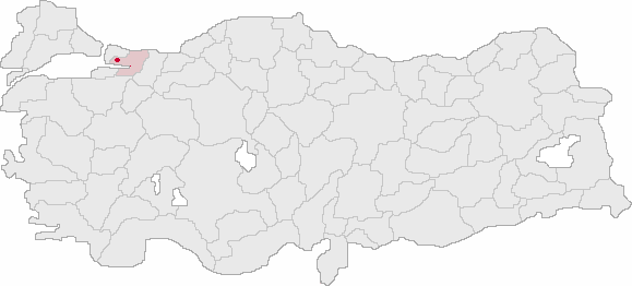 Gebze'nin haritadaki yeri